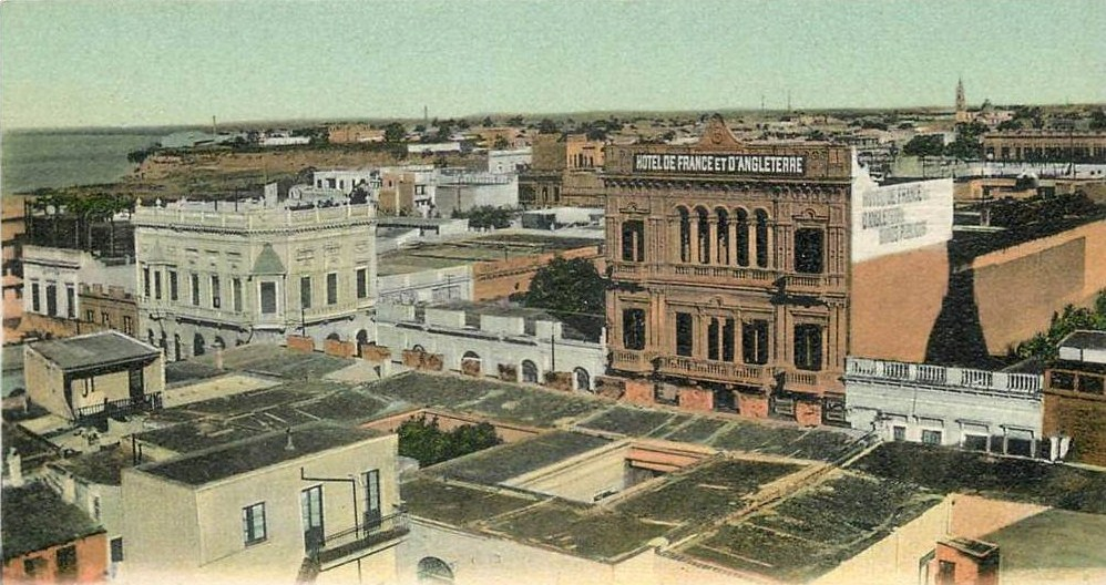 Vista aérea de Rosario de Santa Fe, Argentina. Se ve el Hotel de France en la calle Córdoba, edificio del actual Liceo Avellaneda.